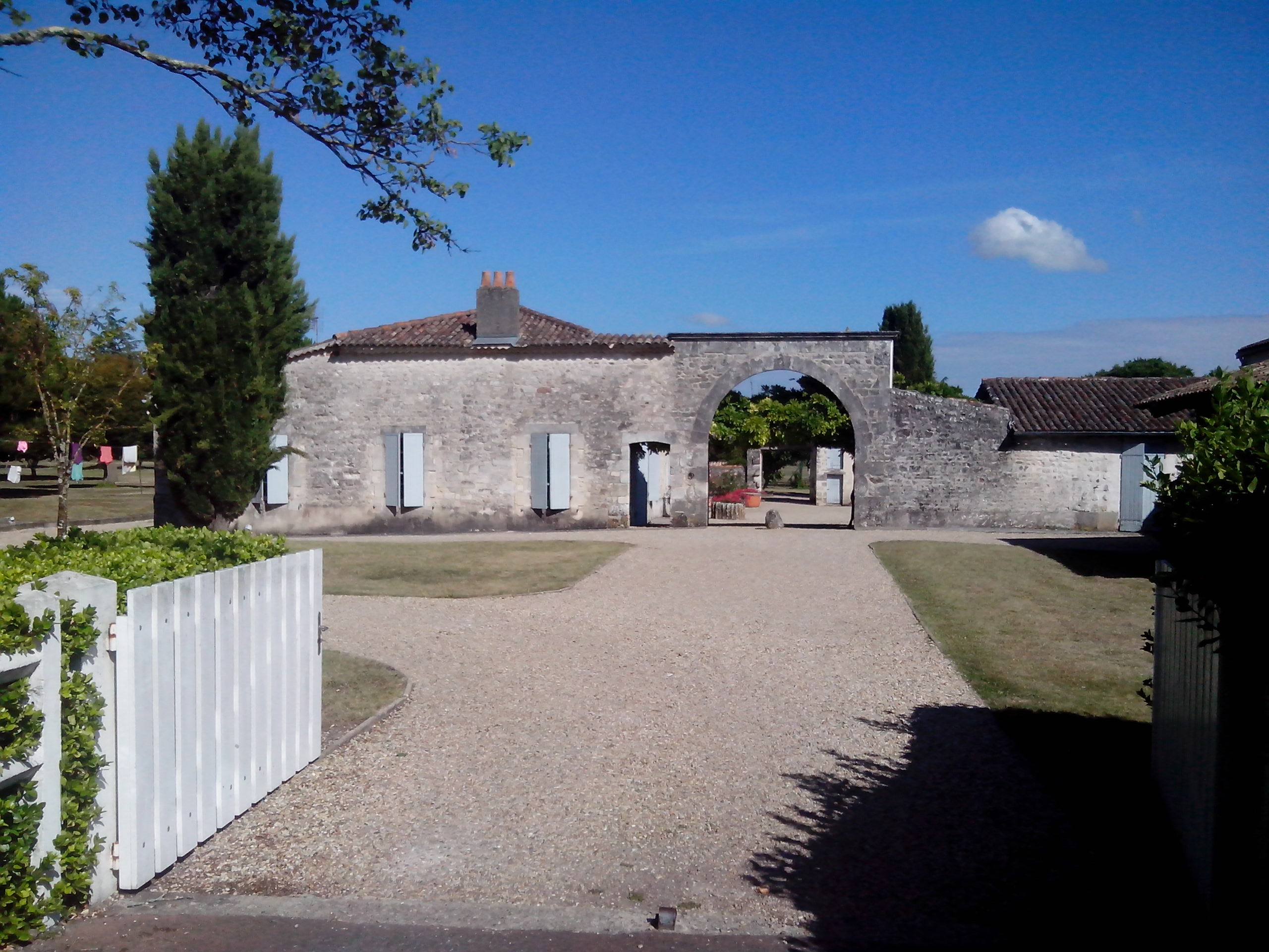 Maison ancienne à Breuillet